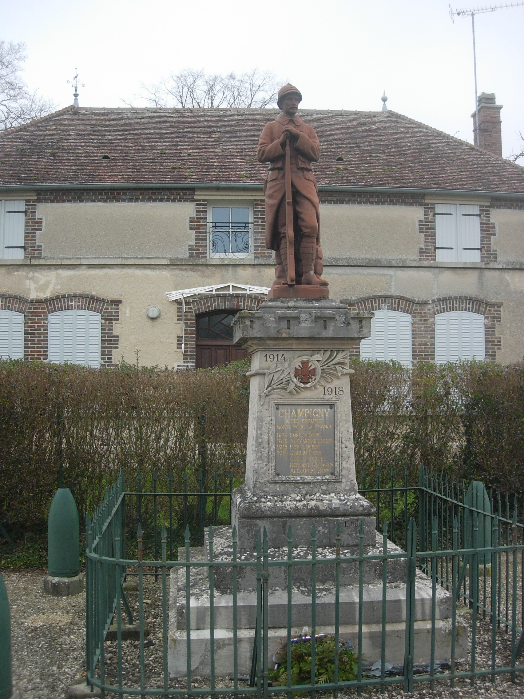 Monument aux morts de Champigny